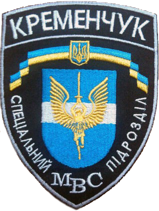 Емблема спецпiдроздiлу особливого призначення МВС України «Кременчук».